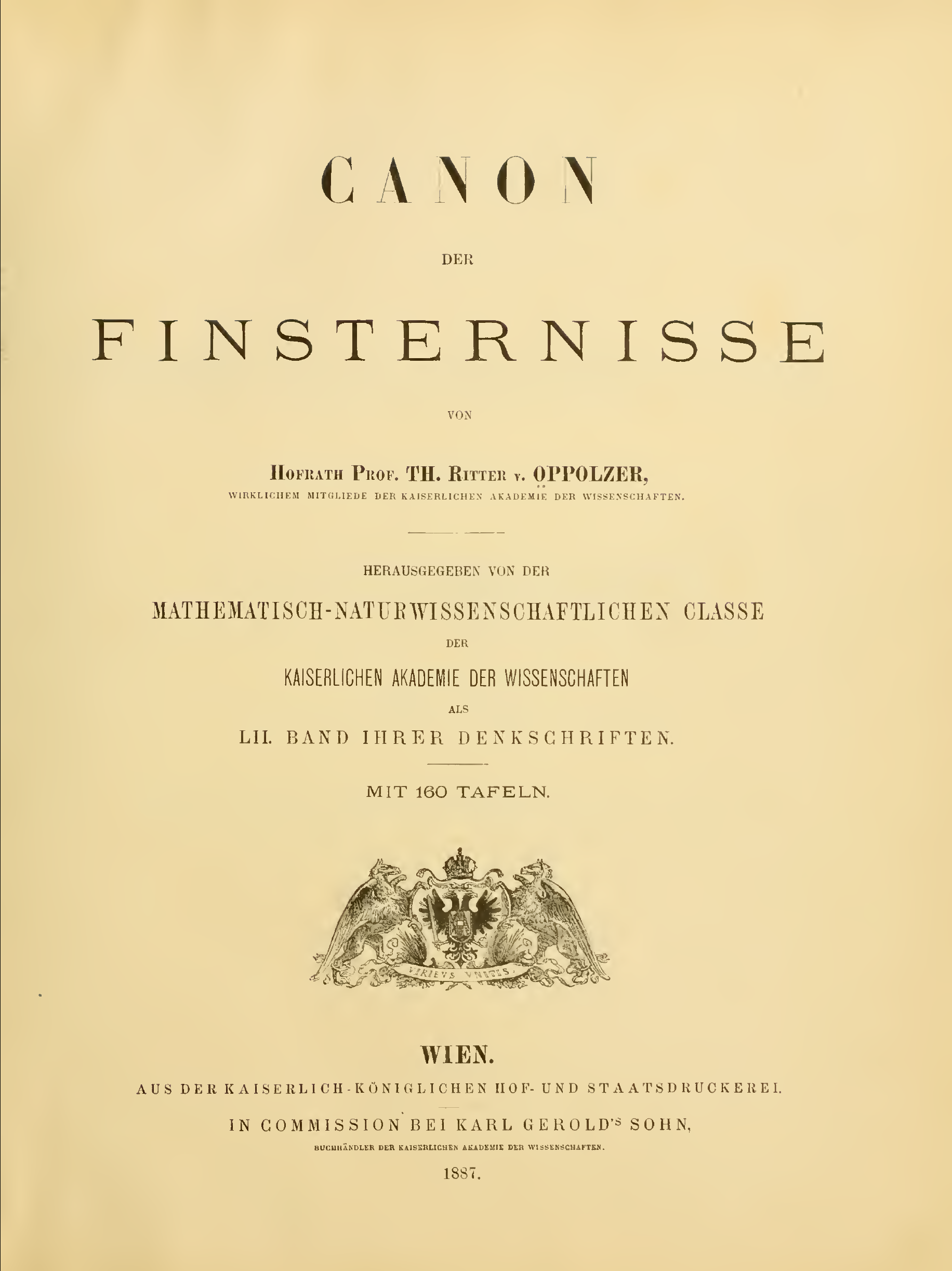 Deckblatt des Canon der Finsterniss